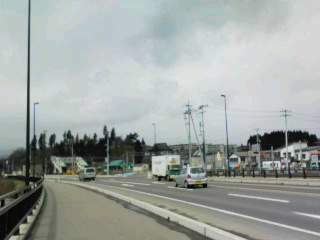 新城の旧国道